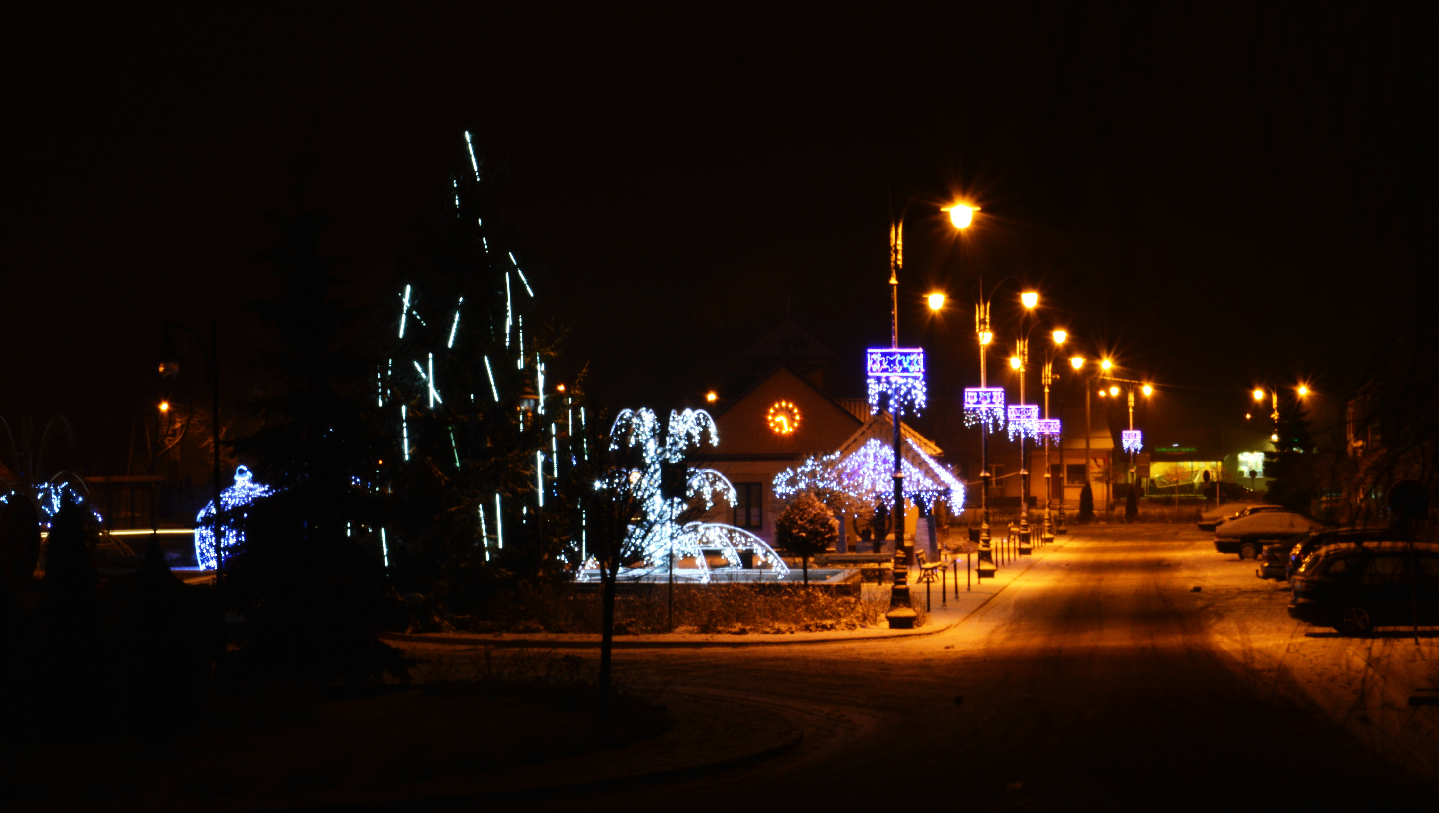 połaniecki rynek nocą